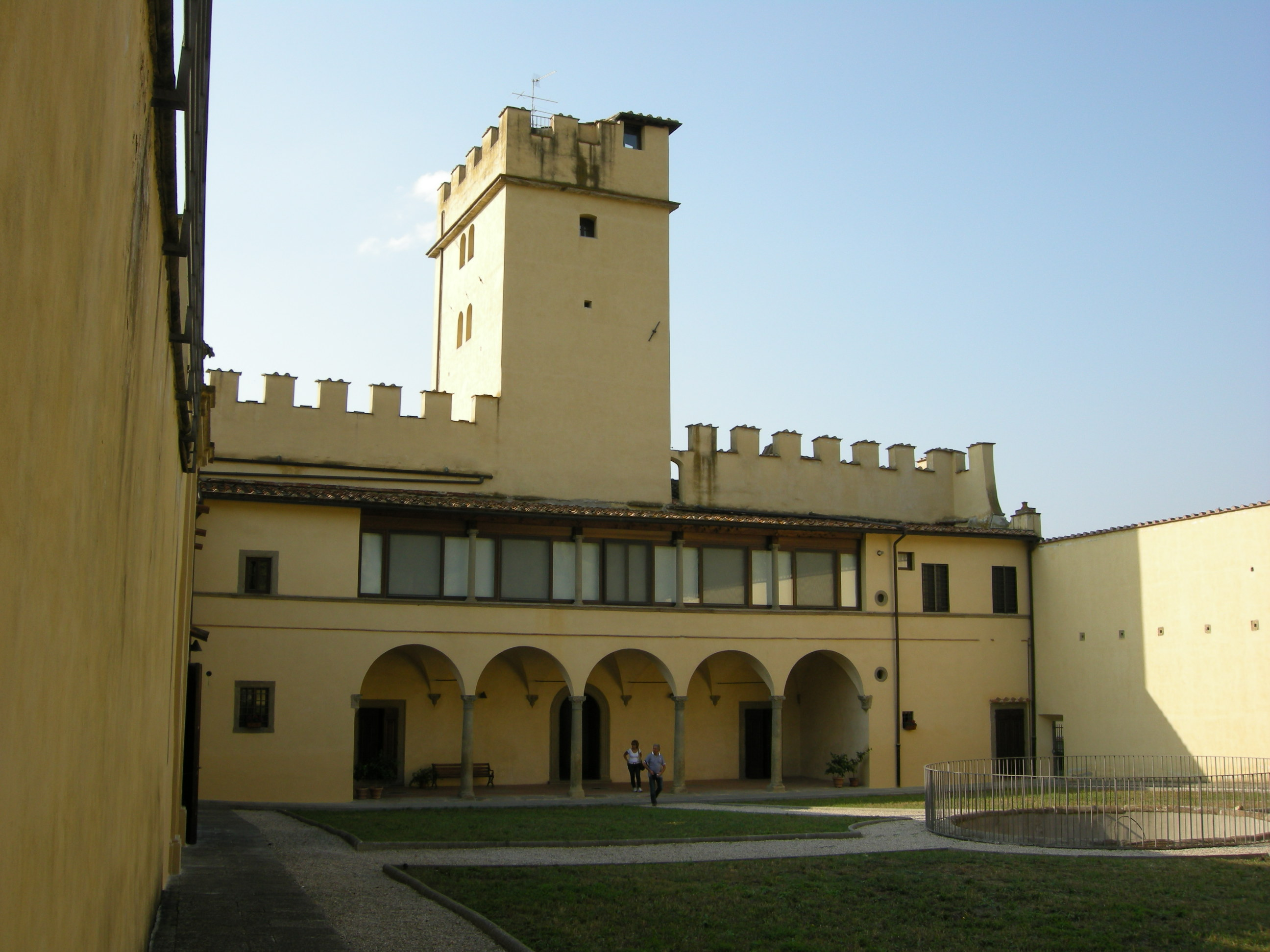 Castello di torregalli, giardino murato